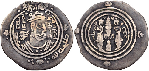 Dracma usado entre o reinado dos califas Iázide I e Maruane I com inscrição do governador Talha ibne Ubaidalá